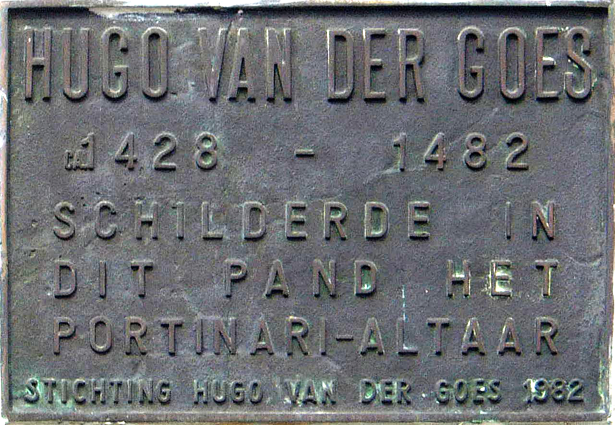 Gedenkplaat Hugo van der Goes in Gent